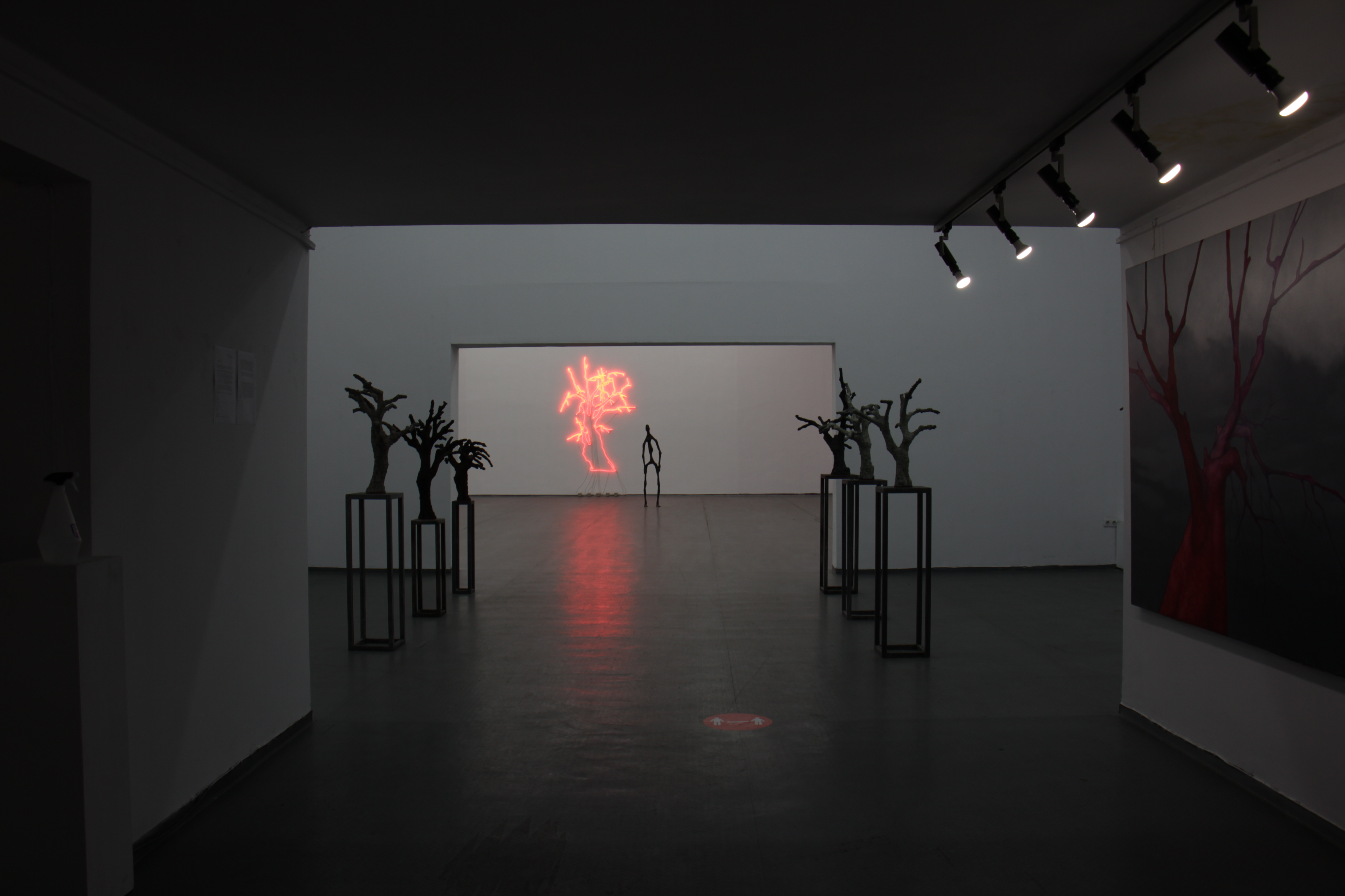 поглед към изложбата на Венцислав Занков "ПРЕД МЕН" 2020, галерия Райко Алексиев, София